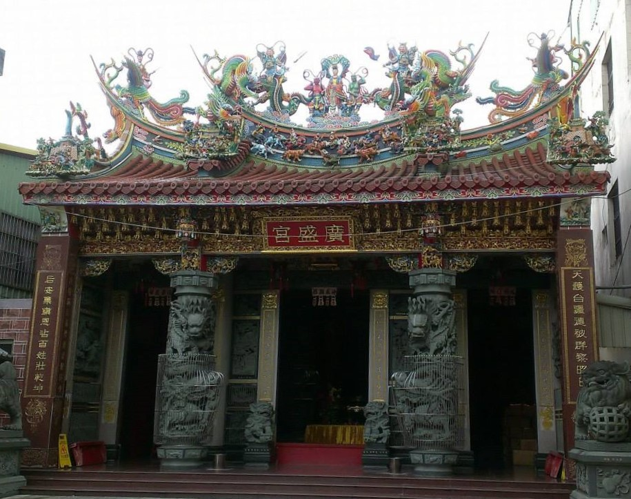 集集廣盛宮